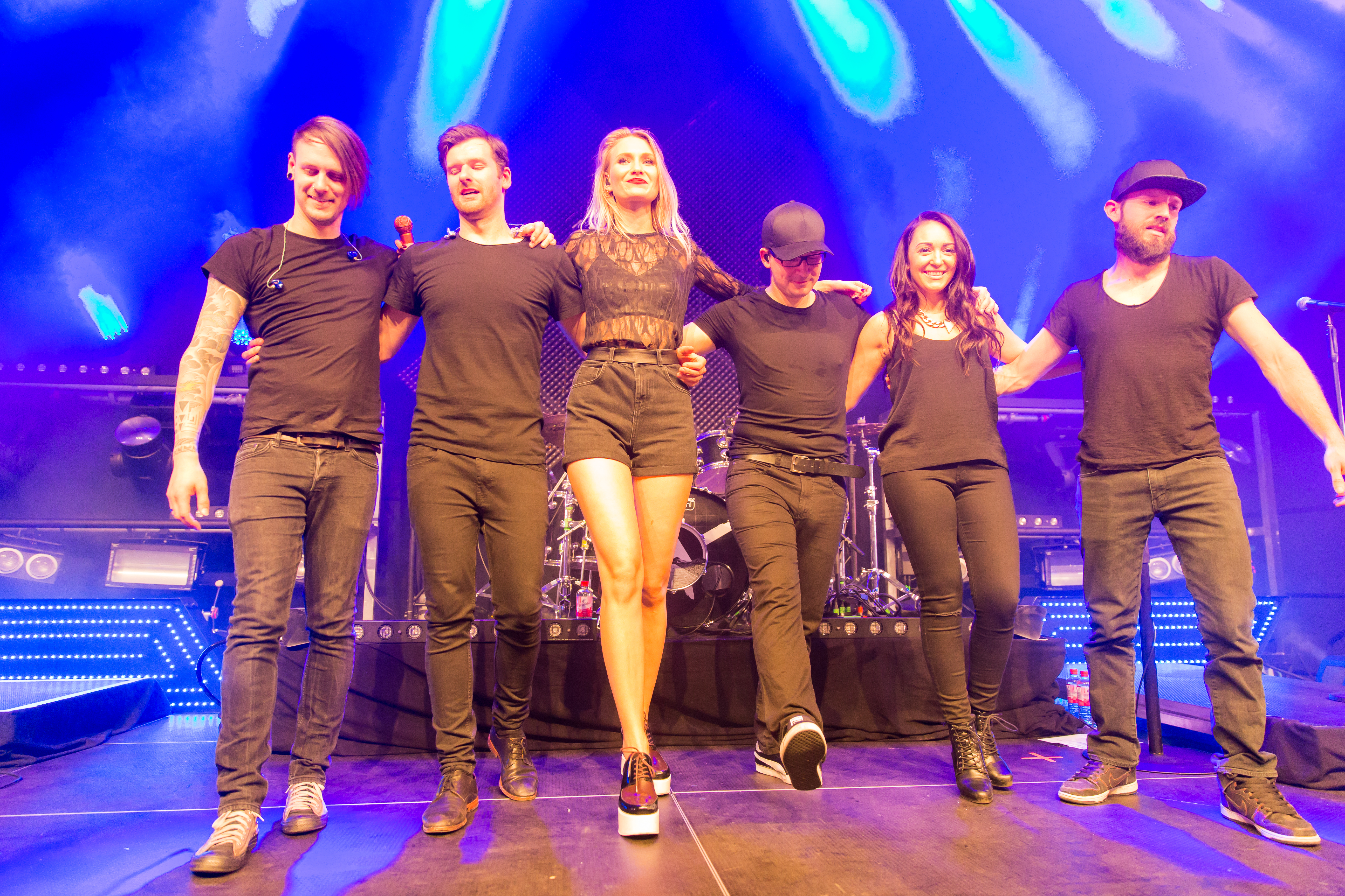 Glasperlenspiel, Darmstadt Centralstation